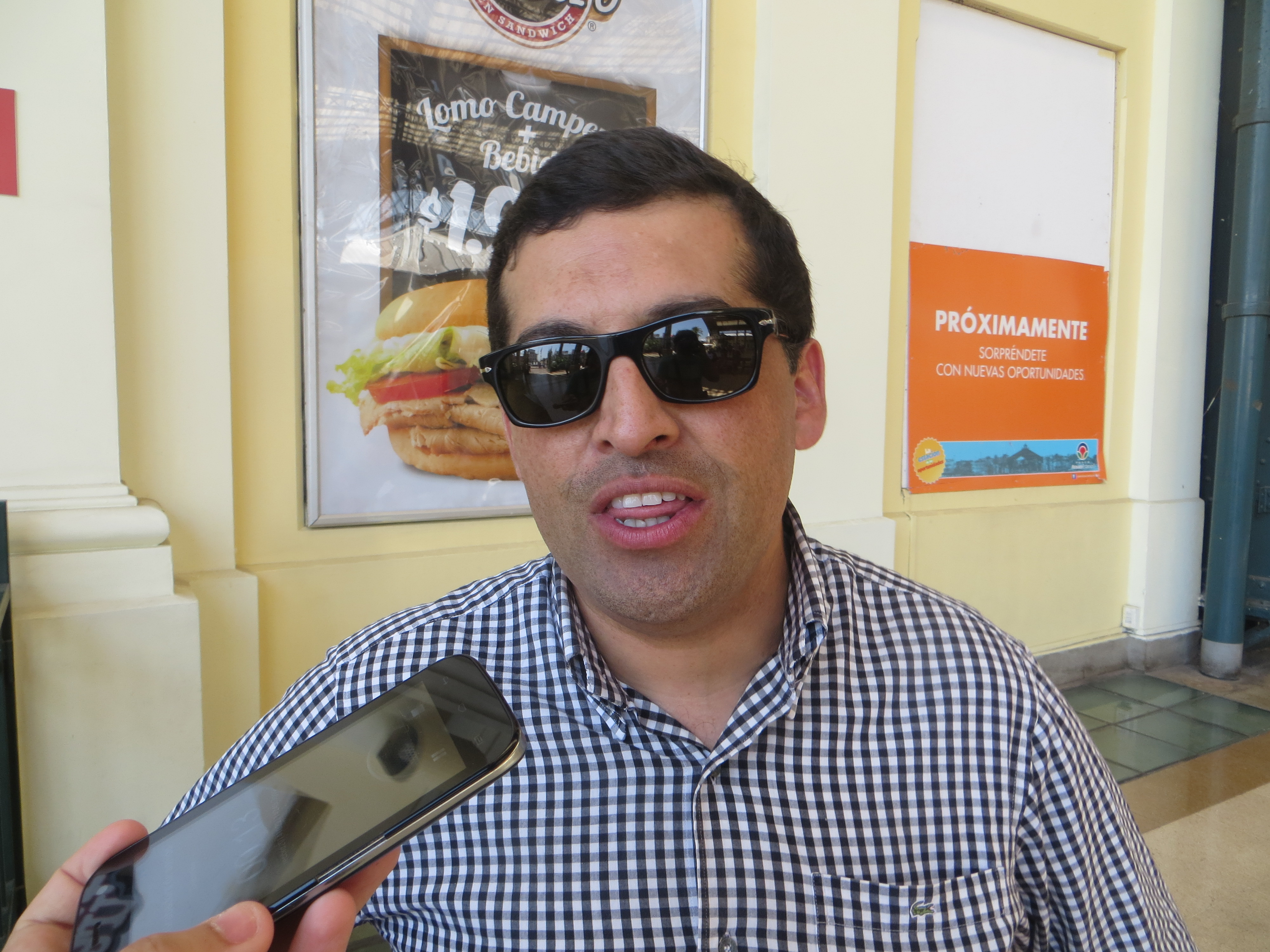 Gustavo Rubio Mori siendo entrevistado por diario El Marino, en la Estación Central de Santiago, durante una actividad de la Municipalidad de Litueche, en octubre de 2014.